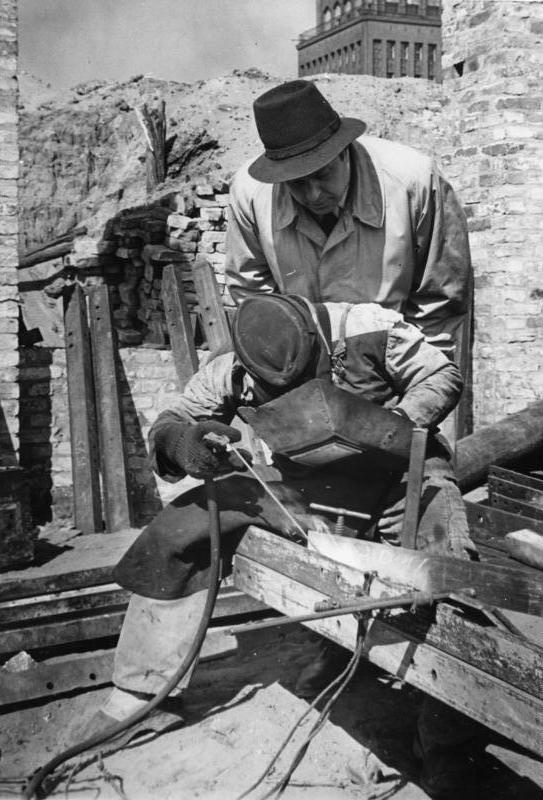 Berlin, Architekt Leowald auf Baustelle Hydromentwerk Rummelsburg, Berlin U.B.z.: Der Architekt des Hydromentwerkes, Prof. [Georg] Leowald beobachtet hier die Schweißung eines wichtigen Bauteiles. Aufn.: Illus/Blunck 3016-49 1.4.49 Abgebildete Personen: Leowald, Prof.: Architekt des Hydromentwerkes Berlin-Rummelsburg, DDR